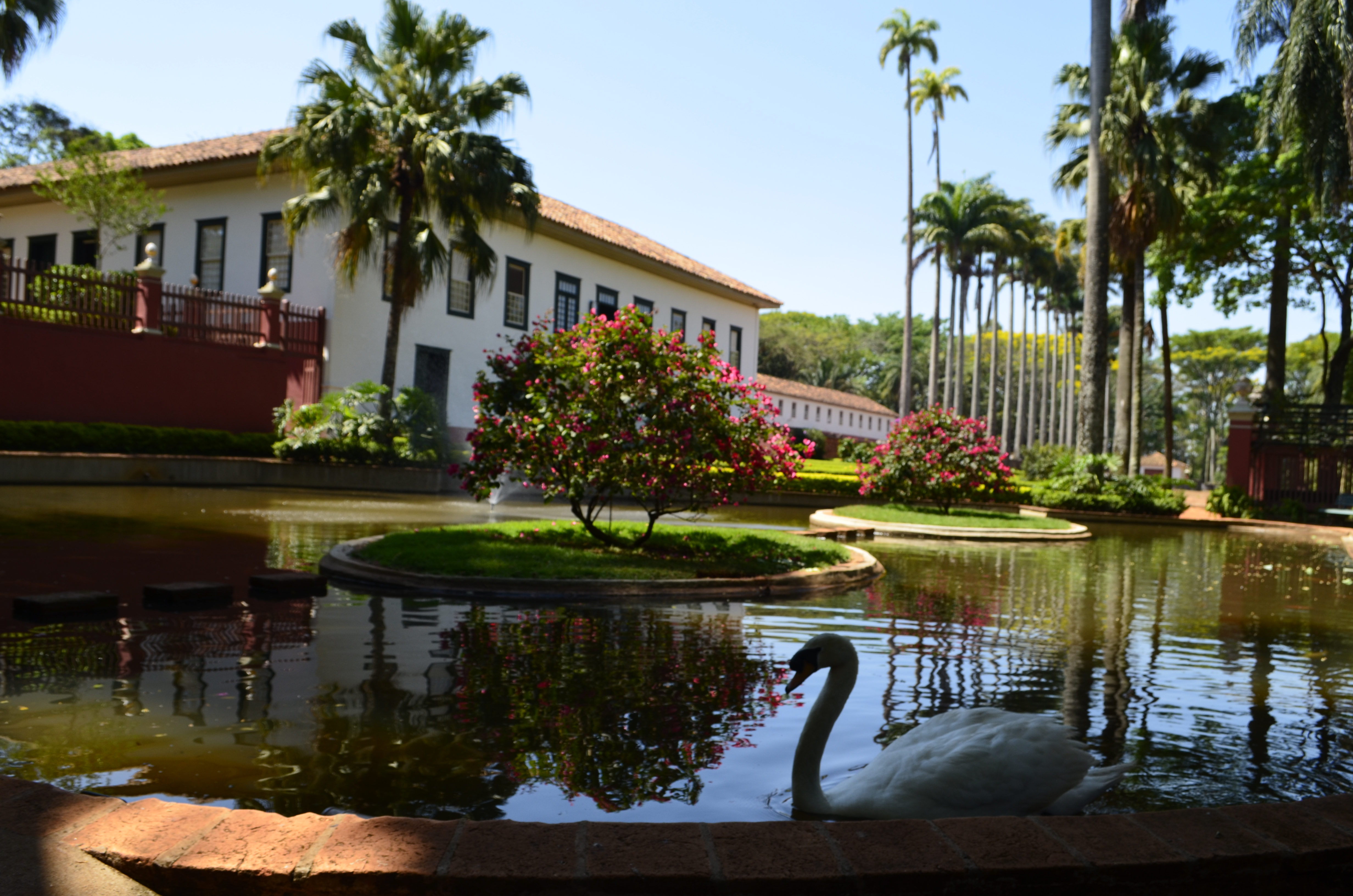 Fazenda do Pinhal, situada no quilômetro 4,5 da Estrada da Broa, com 45 hectares e 1 acre, incluindo vegetação e benfeitorias, tais como : sede da fazenda, senzala, tulha, terreiros de café, cocheiras e pomar murado